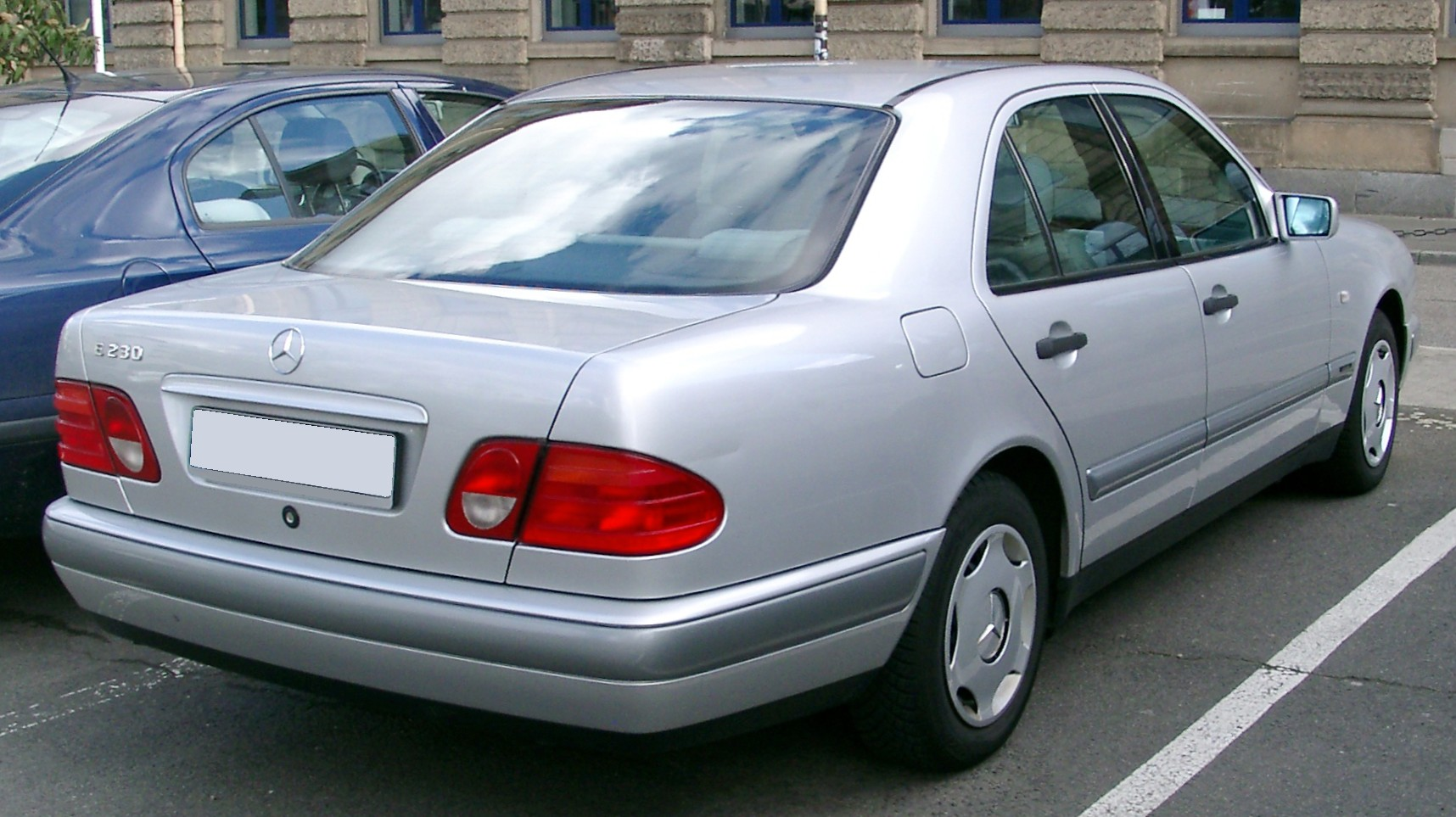 Mercedes-Benz W210